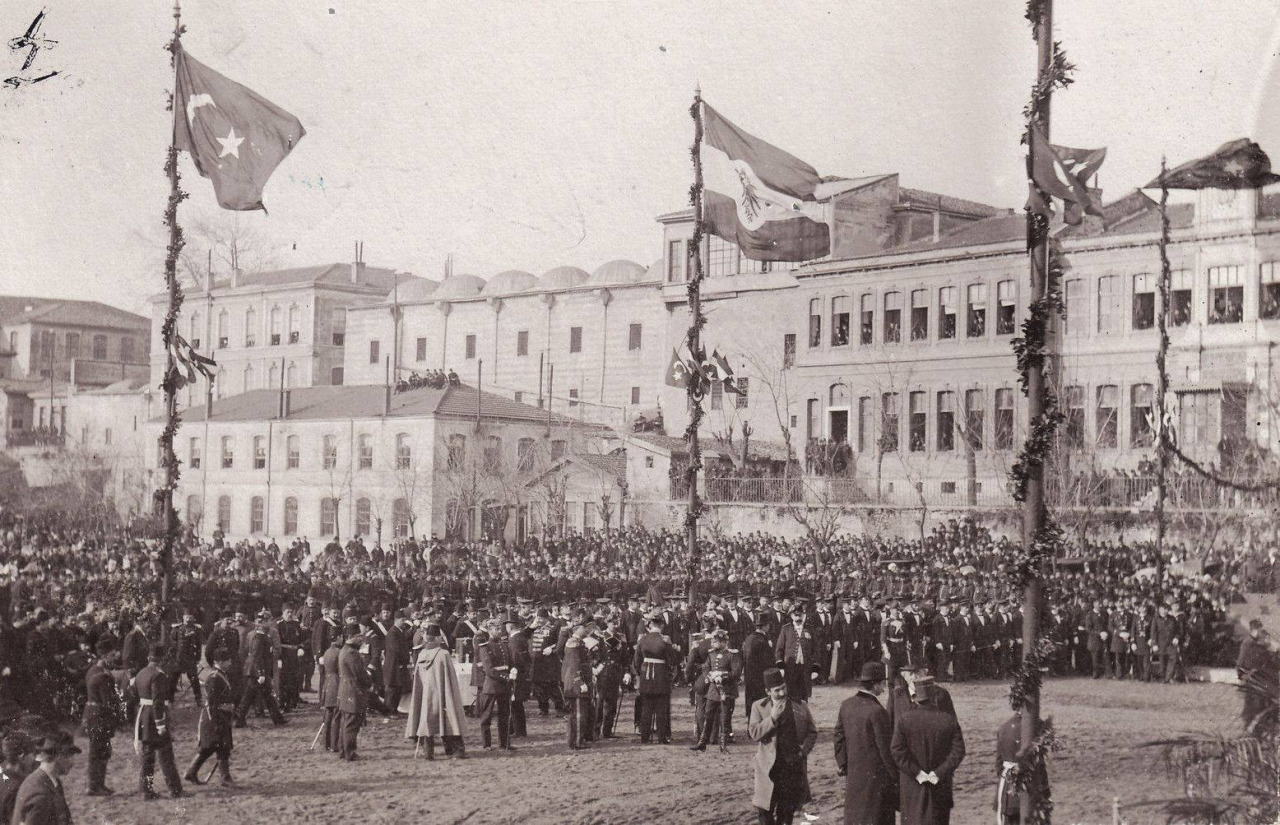 Alman Çeşmesi açılış, 1901